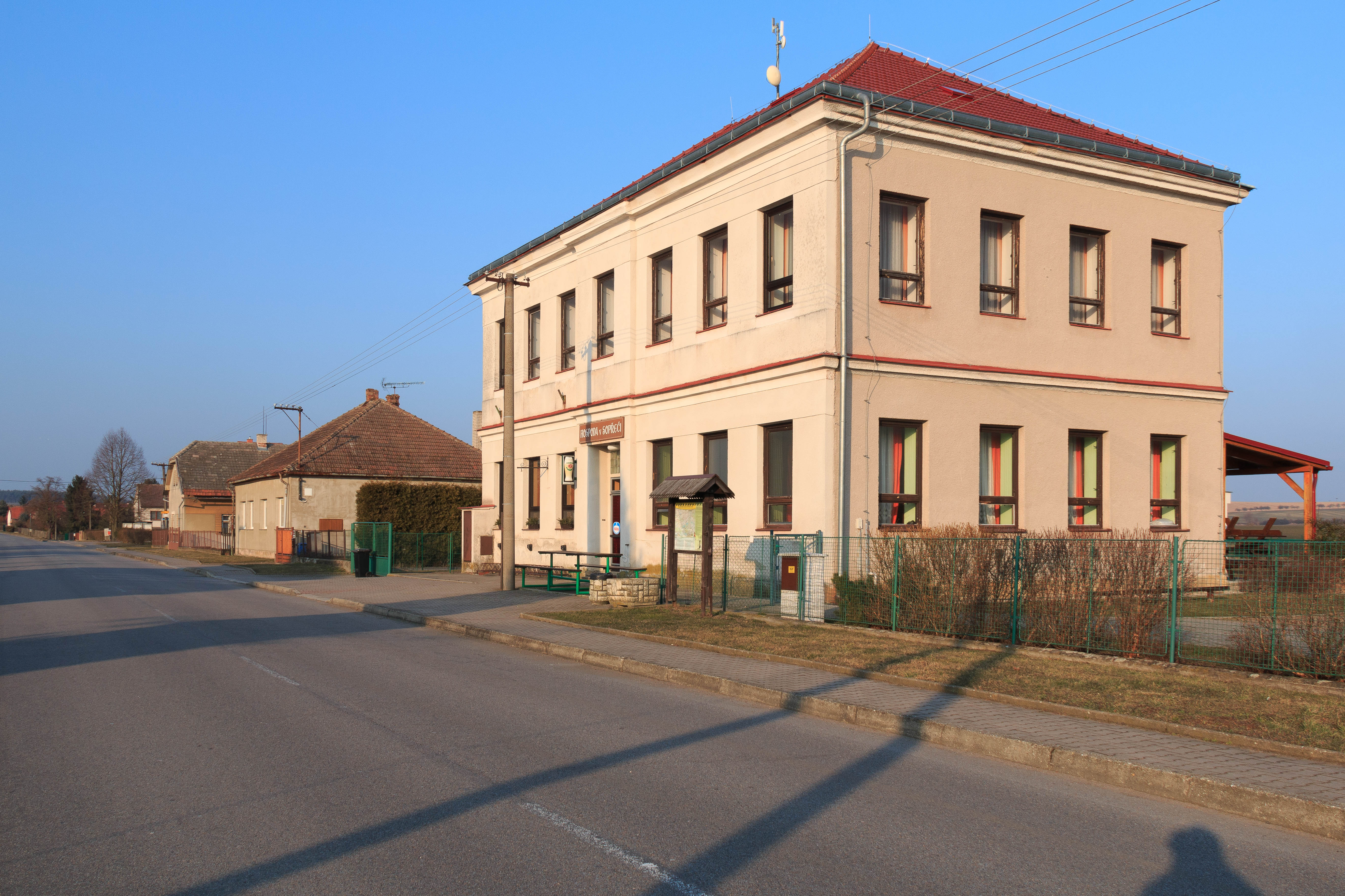 Sopřeč bývalá škola